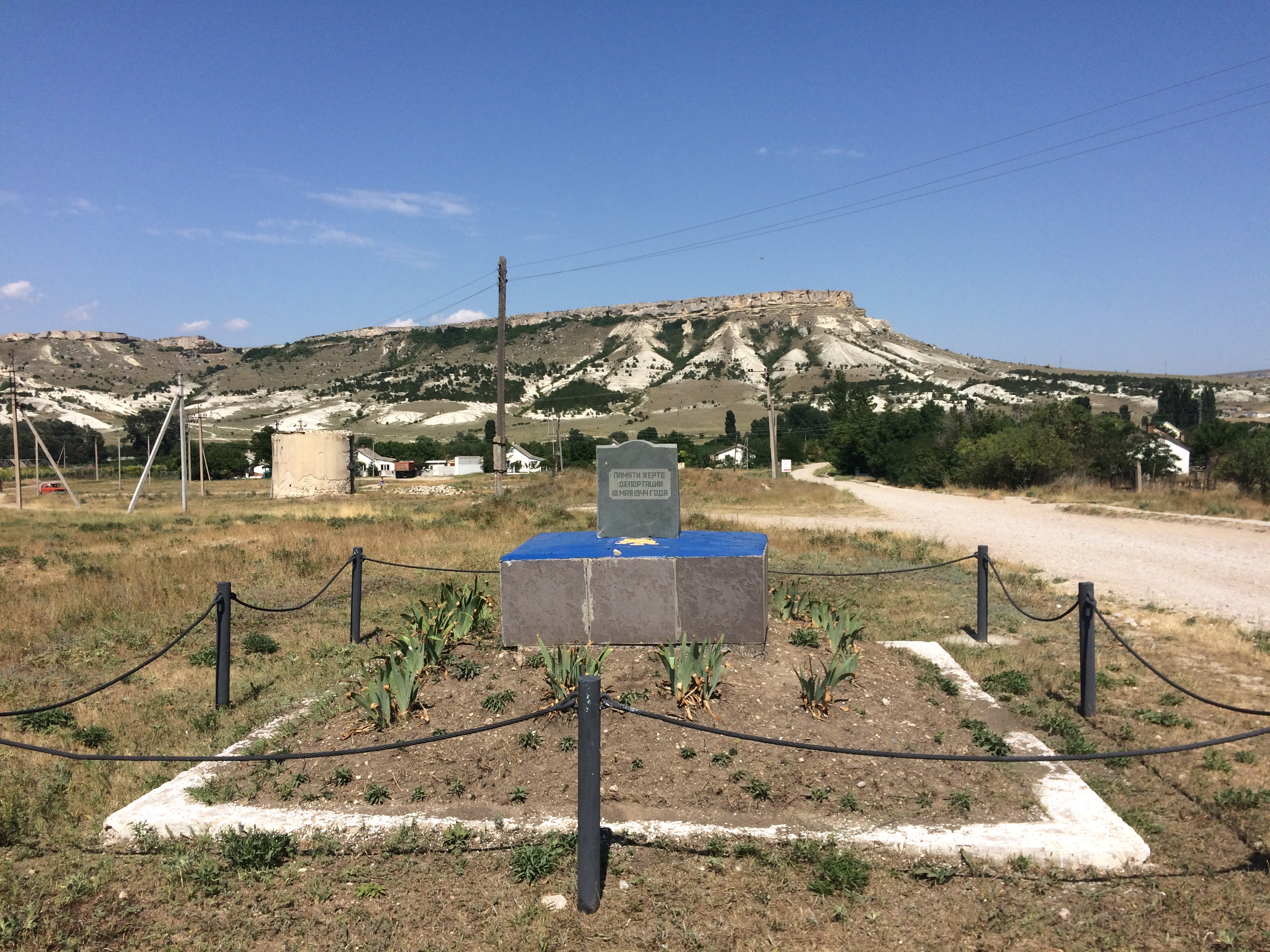 Памятник жертвам депортации 18 мая 1944 года с. Белая Скала